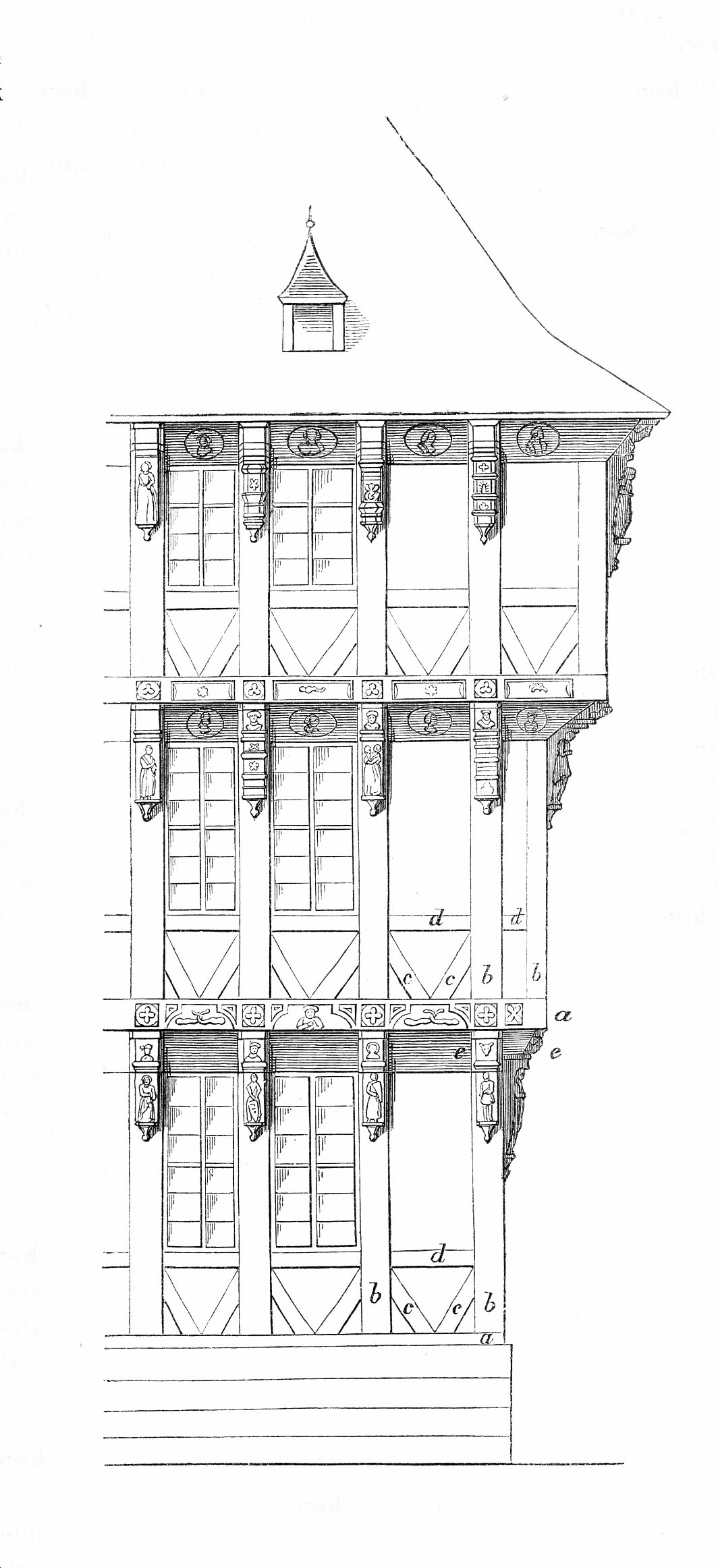 Bild aus den Mittheilungen der kaiserl. königl. Central-Commission zur Erforschung und Erhaltung der Baudenkmale Band 3, 1858. Die inhaltliche Zuordnung entsprechend dem in derselben Kategorie befindlichen Artkikel (PDF-Dokument)